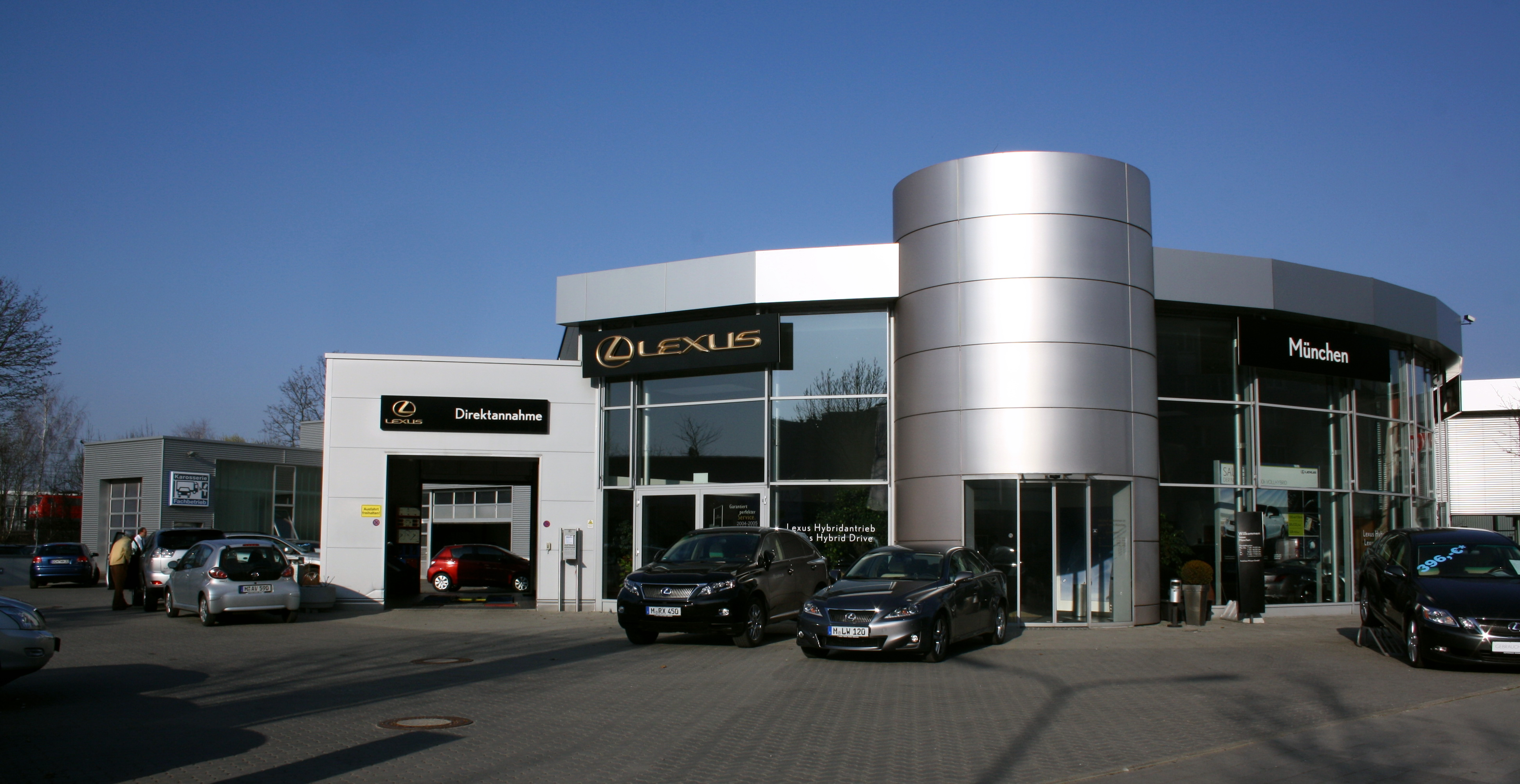 Autohaus Lexus in München in der Landsberger Strasse